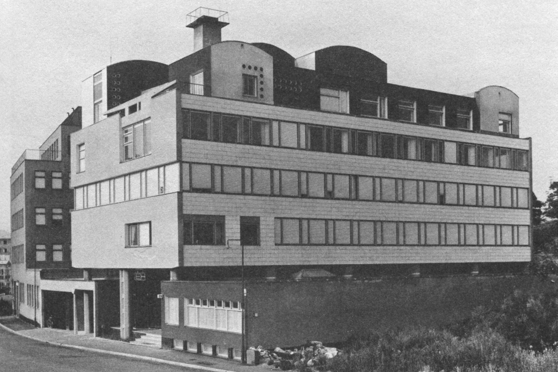 Byggnad för "Enequist, Holme & Co, Warfvinges väg, Stadshagen, Stockholm